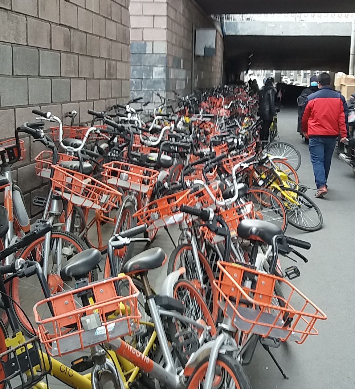 Beijing Mobike Nuisance